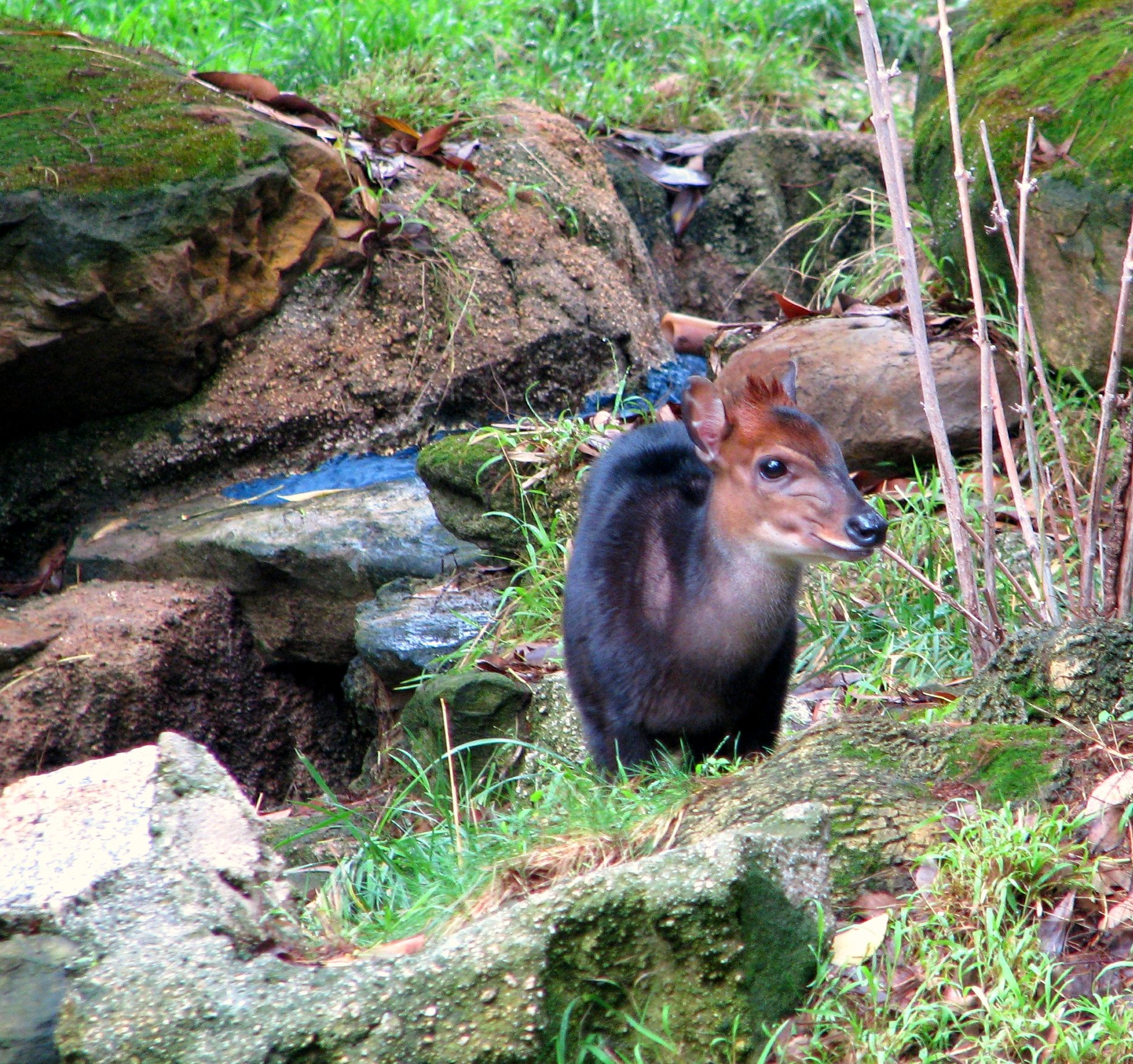 Black Duiker (Cephalophus niger)